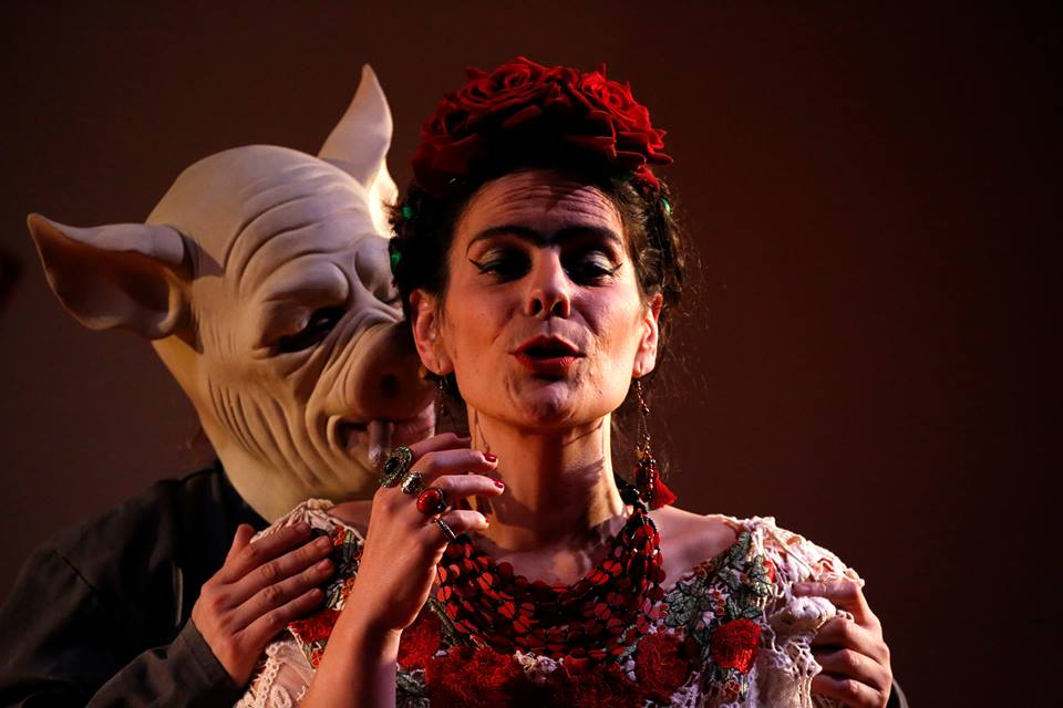 Espectáculo Não Kahlo, das Produções D. Mona.